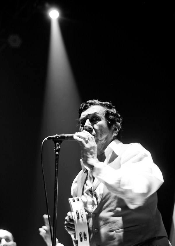 El artista en una presentación oficial.